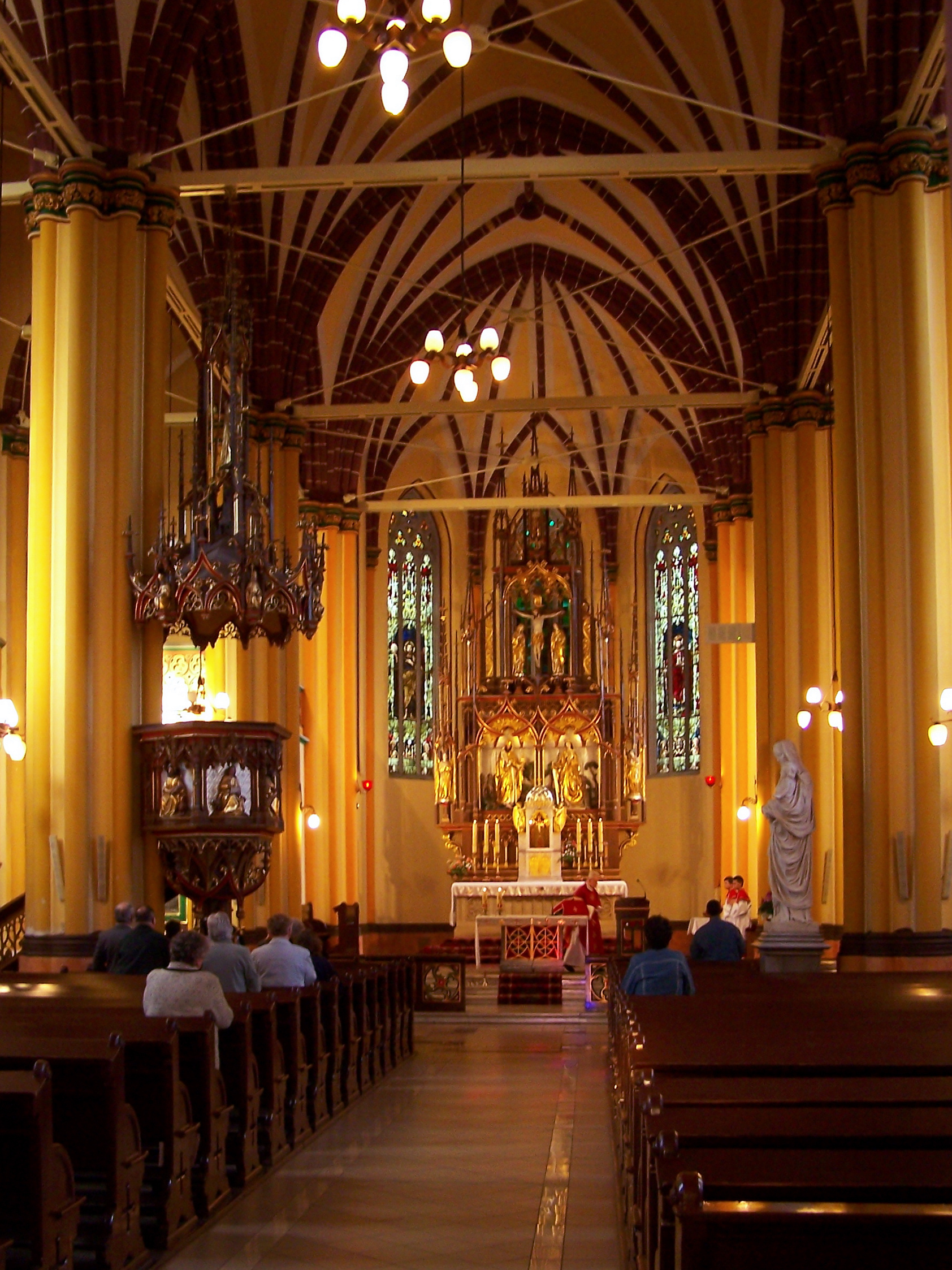 Kościół pw. św. Krzyża w Miechowicach (dzielnica Bytomia). Wybudowany w latach 1856-1864 w stylu neogotyckim wg projektu Augusta Sollera.